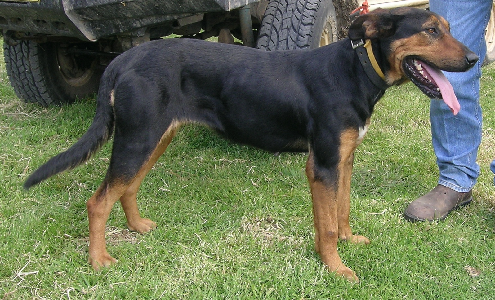 A Huntaway dog